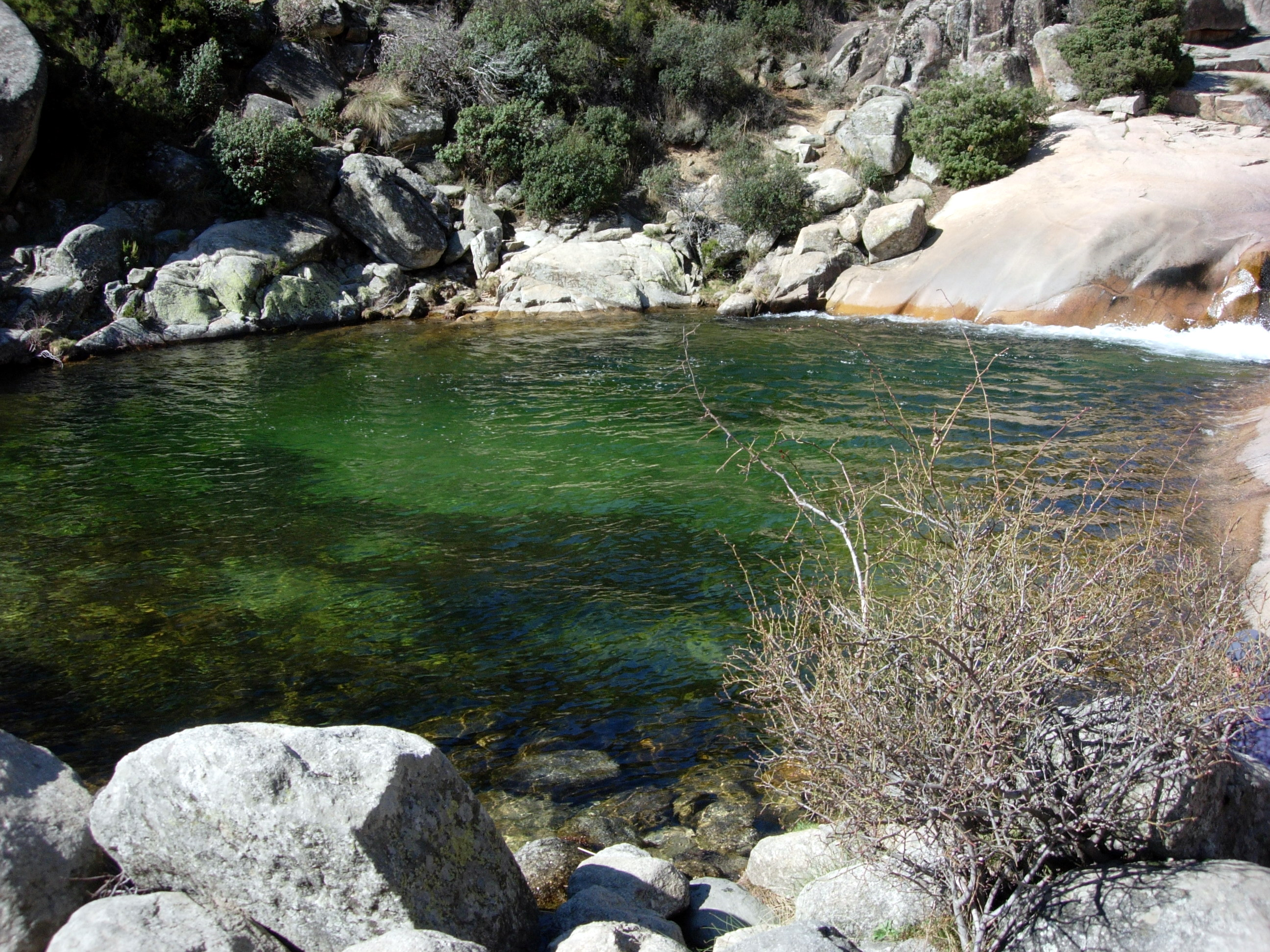 Sitio conocidísimo en la Pedriza